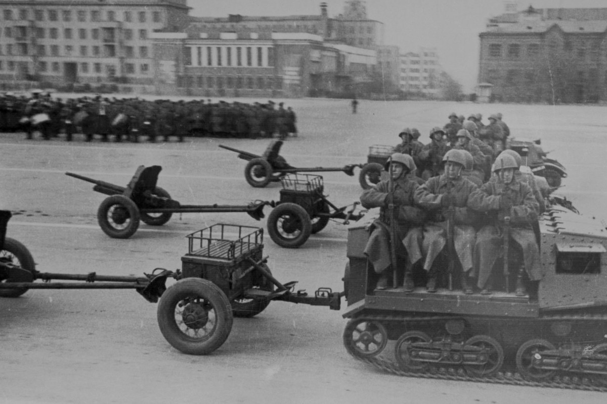 Бронированные тягачи Комсомолец Т-20. Военный парад в Куйбышеве 7 ноября 1941 г.